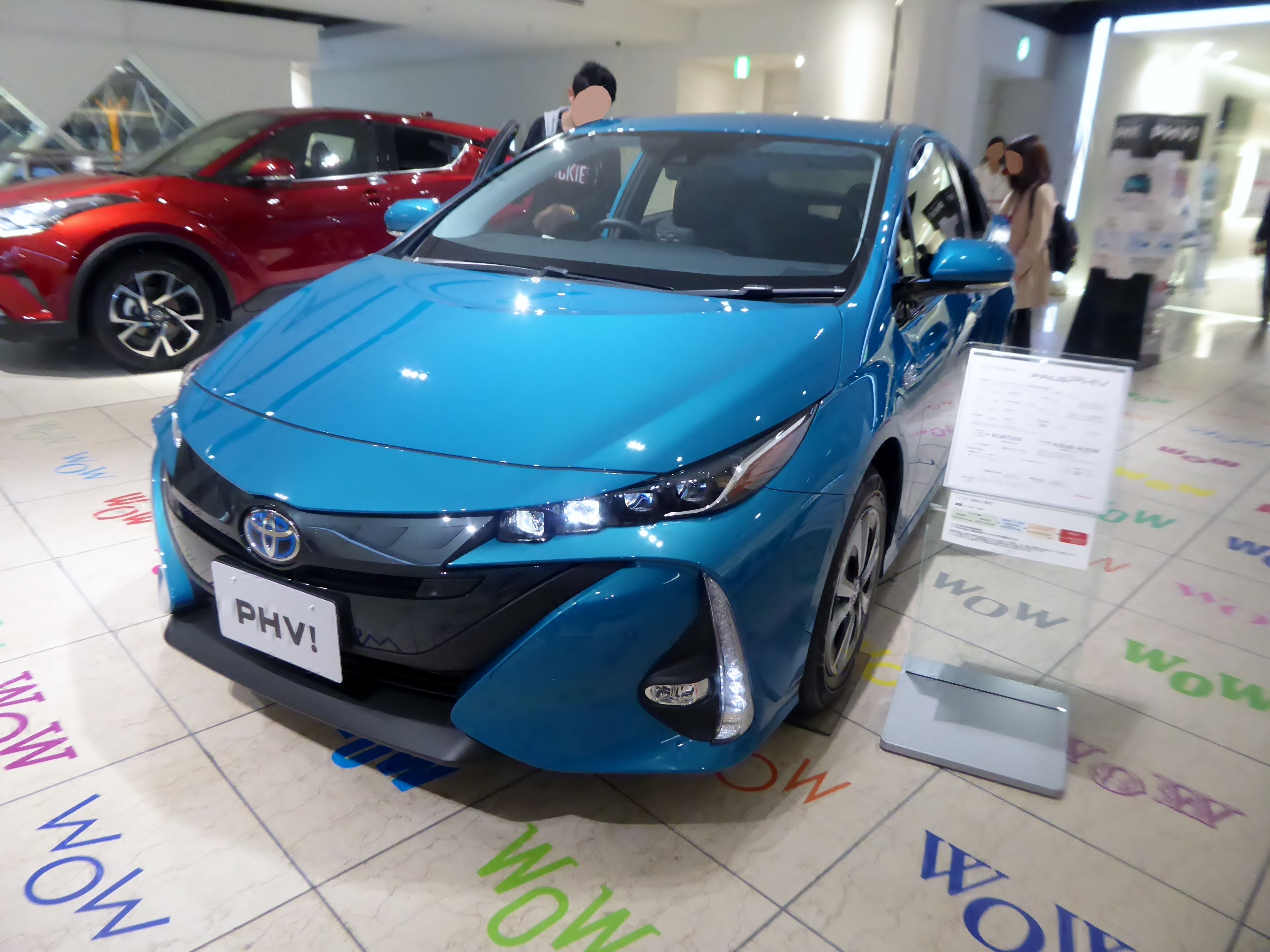 DLA-ZVW52-AHXGB型トヨタ・プリウスPHV Aをフロントから撮影。